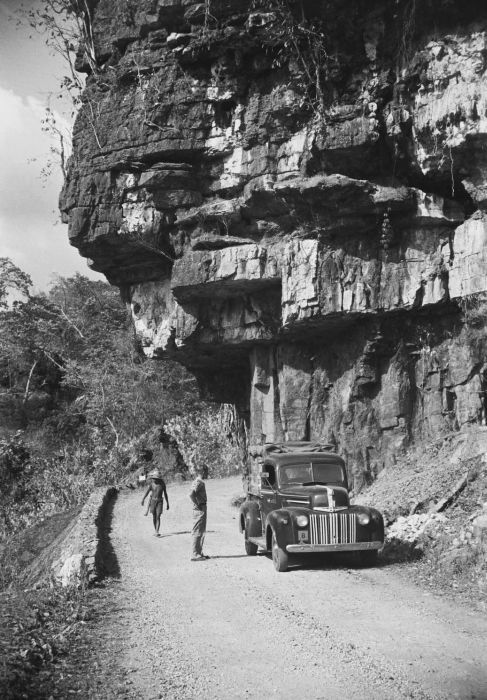 negatief. Pick-up onder een rotsformatie bij Maros